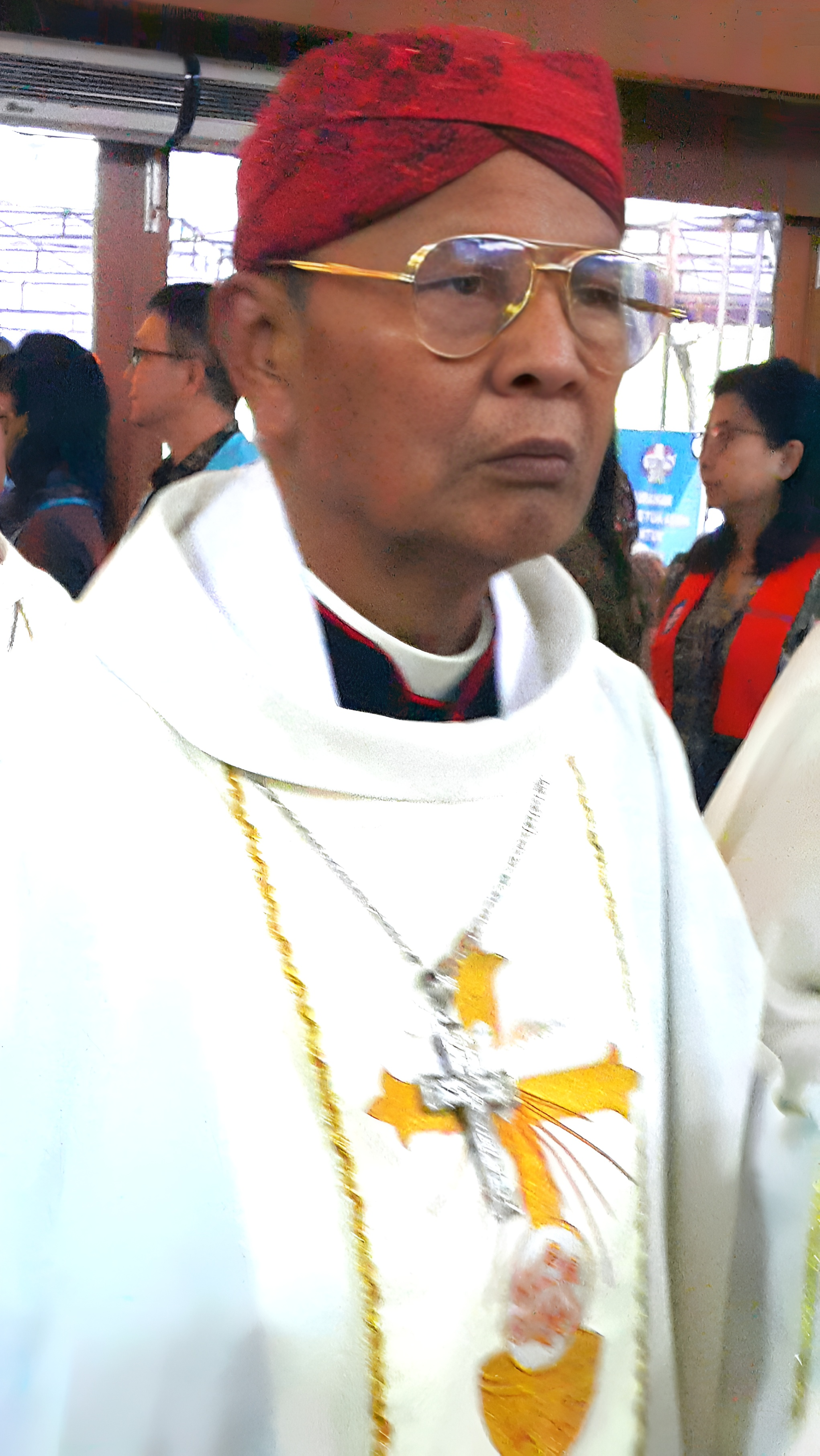 Mgr Julianus Sunarka, Uskup Emeritus Purwokerto